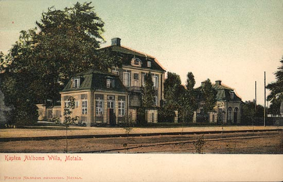 Motala, Kapten Ahlboms villa. Numera ett hus i kommunens ägo. Fotografiet är från tiden före 1944.